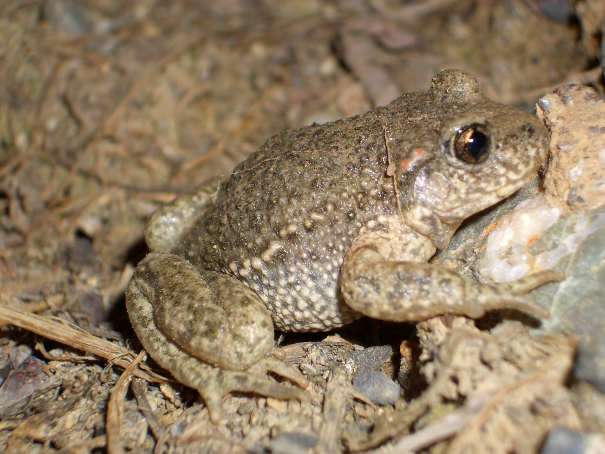 Crapaud accoucheur ou Alytes accoucheur